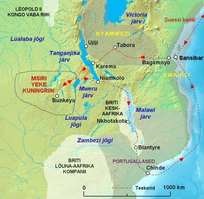 Stairsi ekspeditsioon